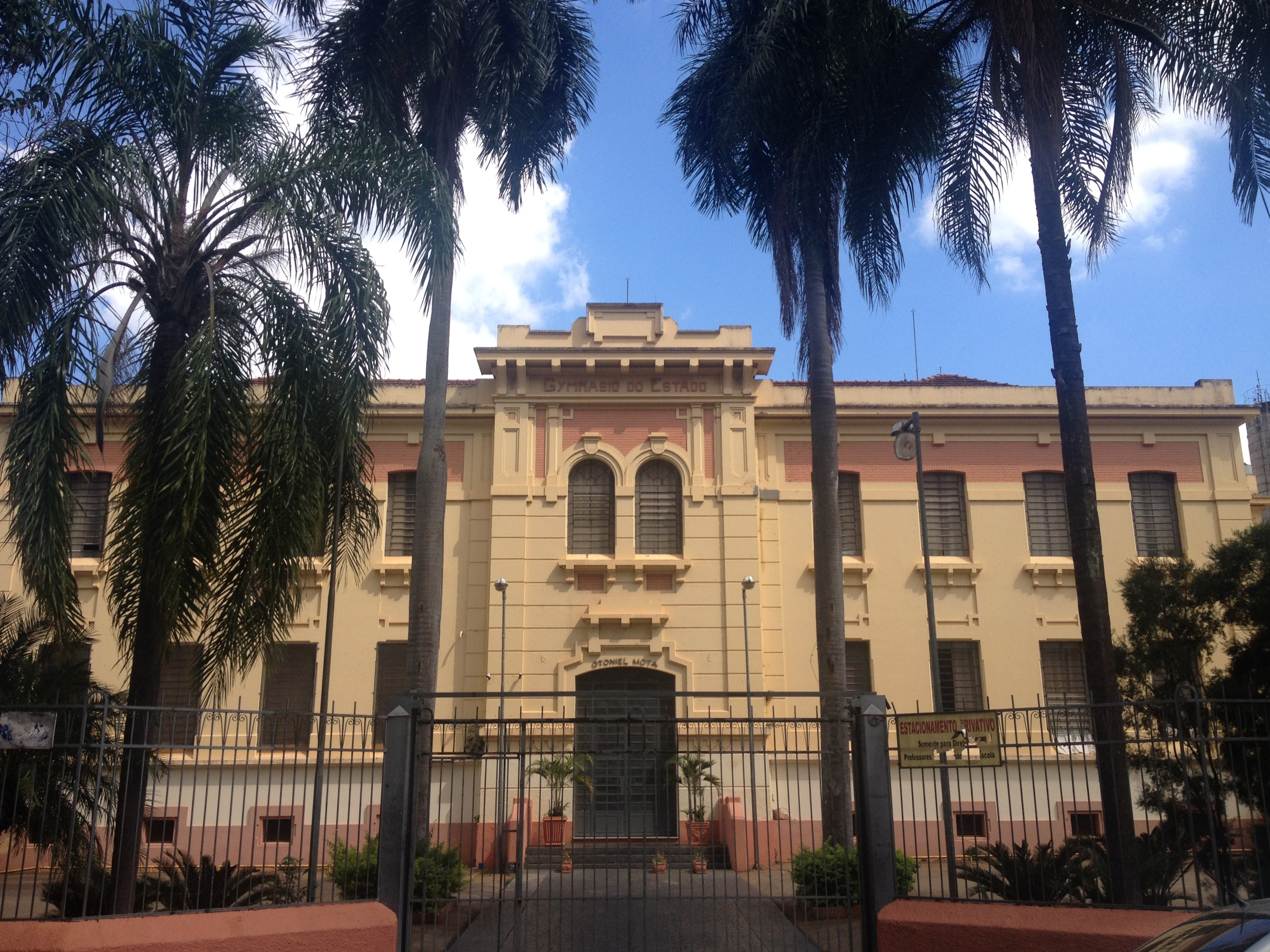 Escola Estadual Otoniel Mota, Ribeirão Preto, SP.